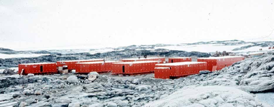 La base antarctique Wilkes en 1957